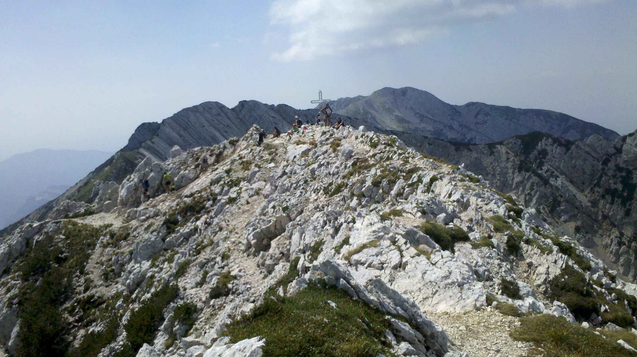 Cima Valdritta August 2013